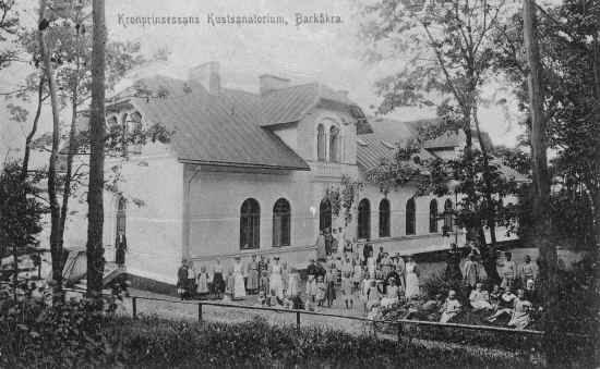 Kronprinsessan Victorias sanatorium, Sverige